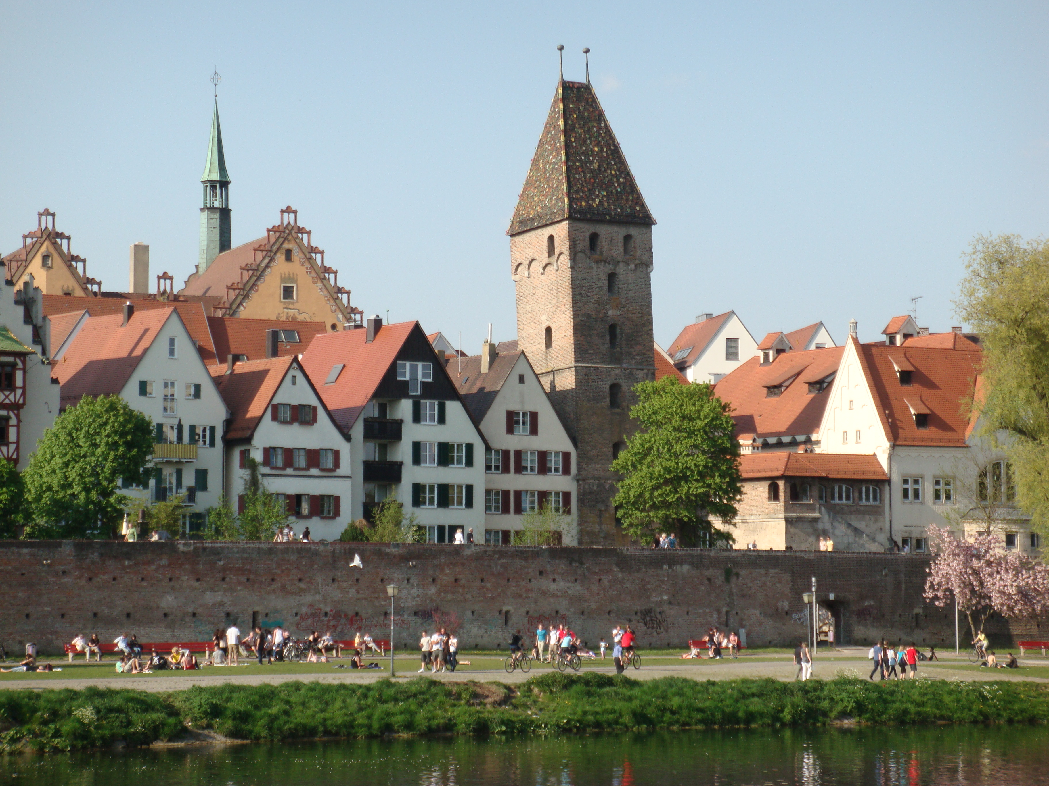 Metzgerturm April 2011